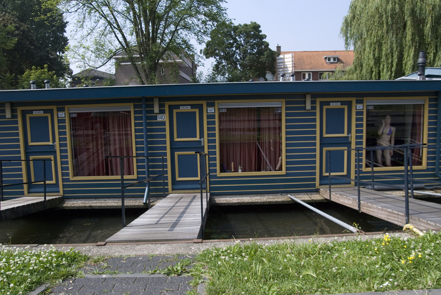 Prostitutie langs de Vecht aan het Zandpad in Utrecht Prostitutie langs de Vecht aan het Zandpad